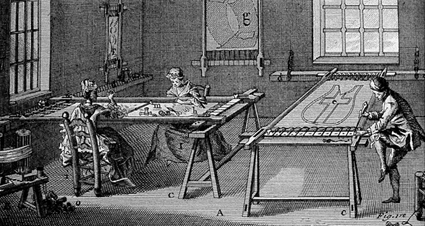 Bastidores en un taller de bordado. L´art du Brodeur. Charles Germain de Saint Aubin. 1780.